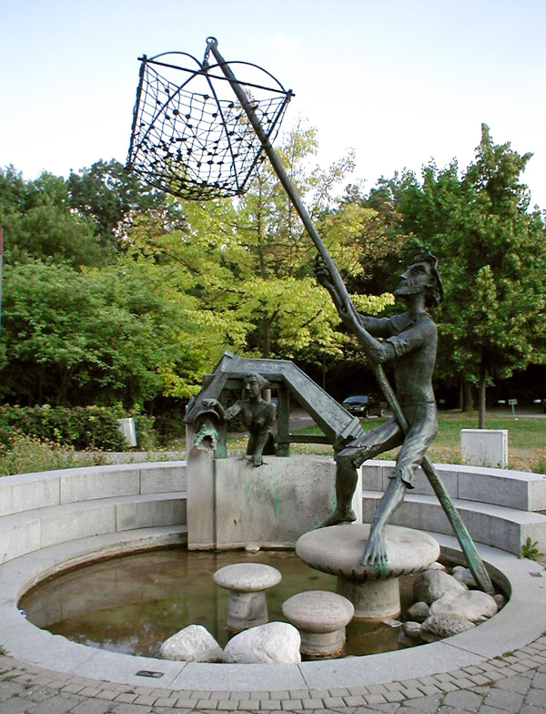 Linsafamer-Brunnen von Dieter Läpple in der Ortsmitte von Heilbronn-Neckargartach